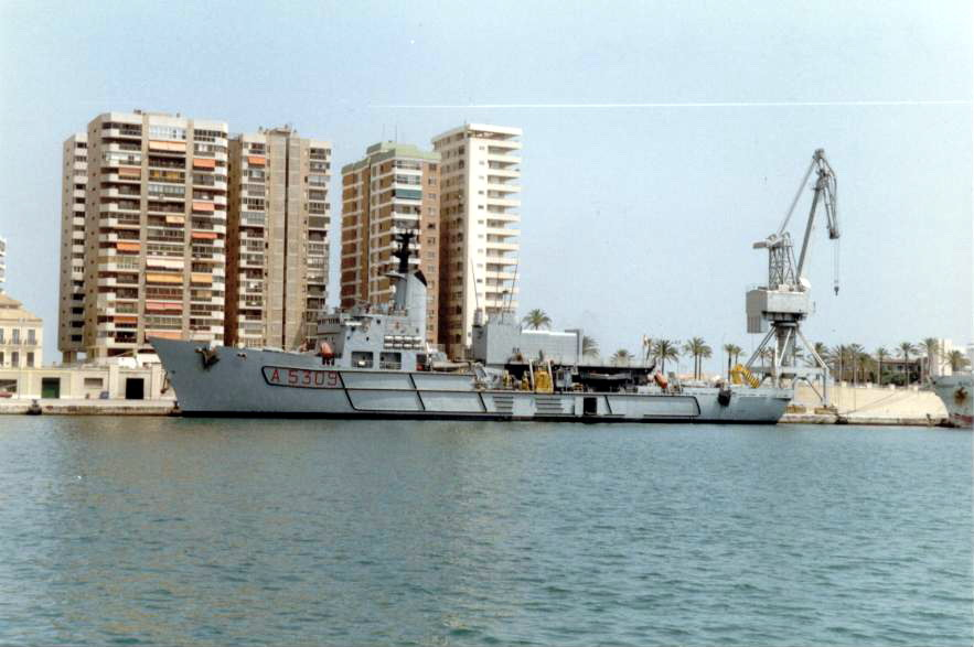 Nave di salvataggio Anteo a Malaga